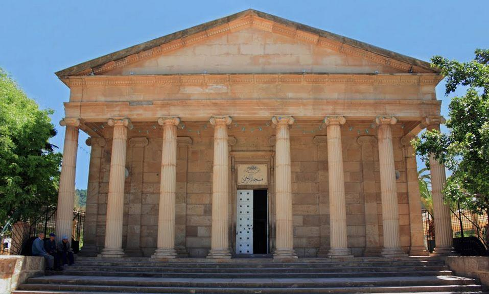 Mosquée El Rahman à Cherchell, initialement elle fut une église à l'époque colloniale